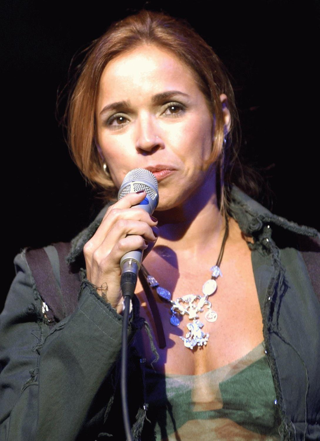 A cantora brasileira Daniela Mercury.